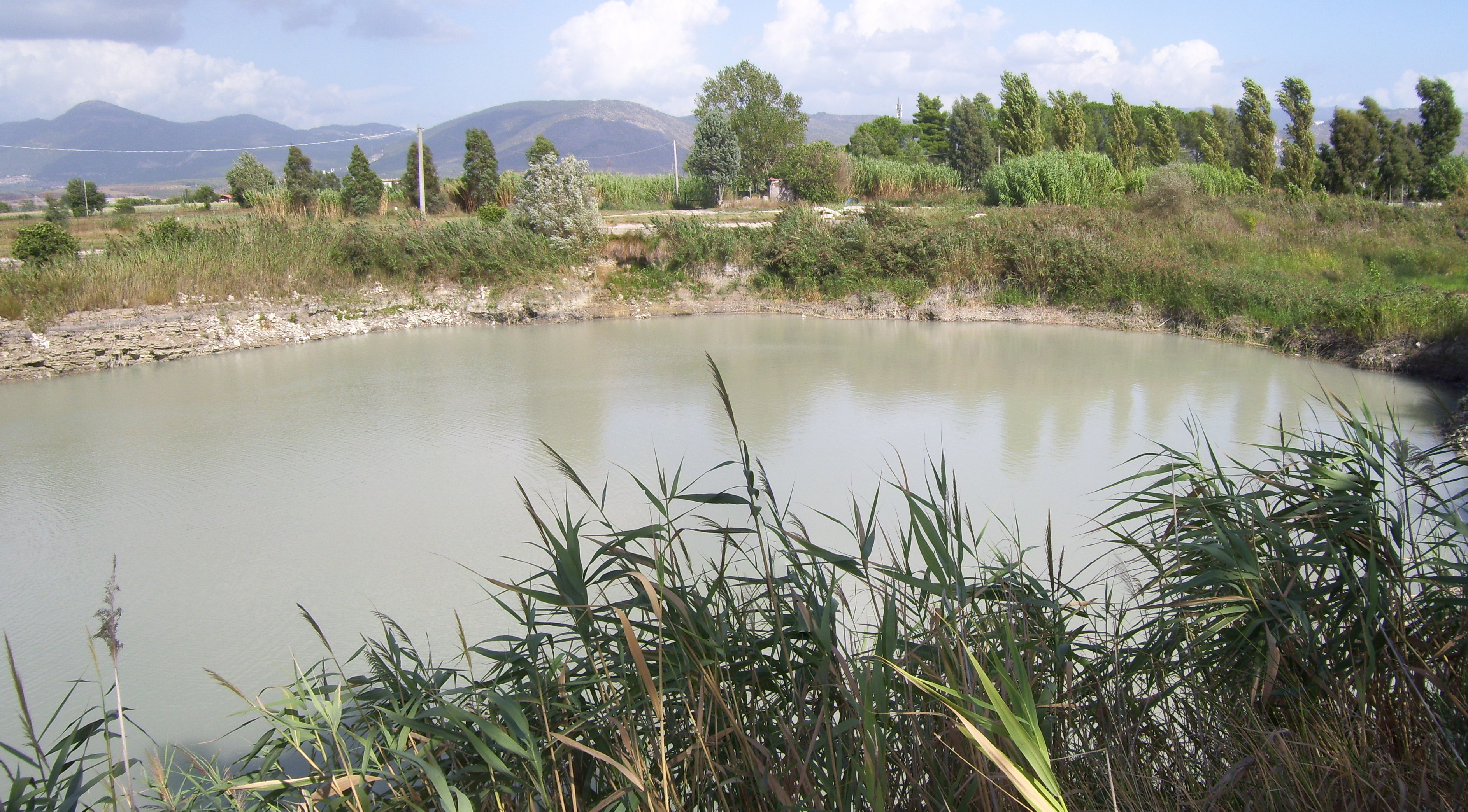 Lago della Regina a Bagni di Tivoli.